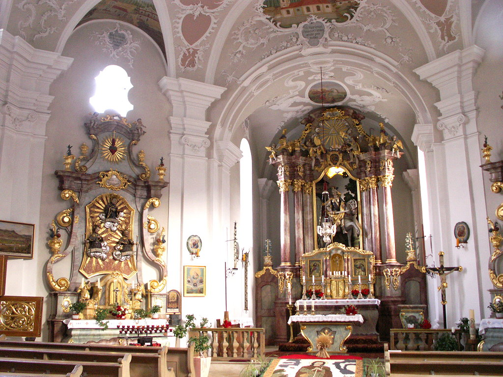 Kirche zu den Drei elenden Heiligen in Griesstetten, Dietfurt an der Altmühl